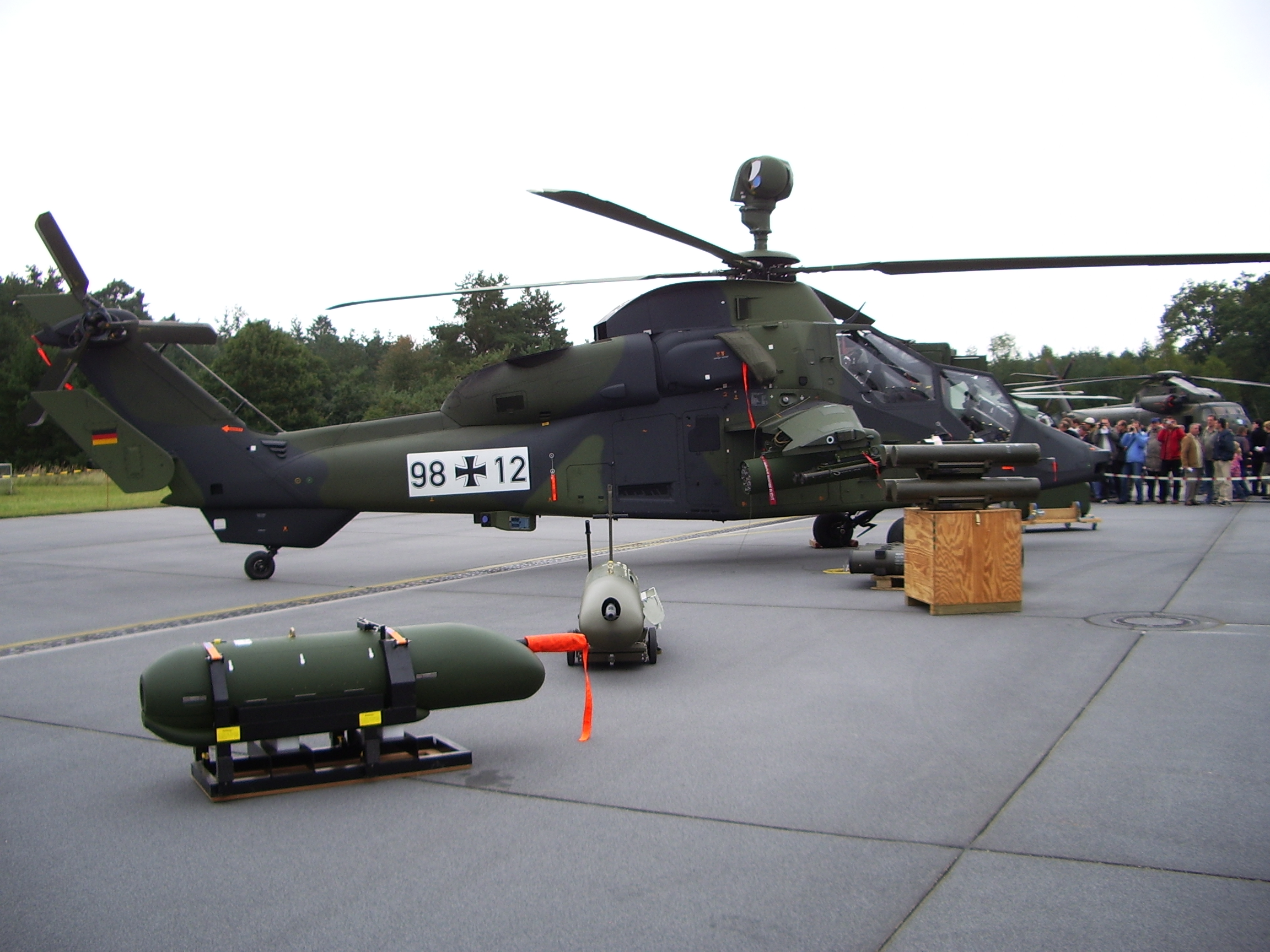 UHT Tiger der WTD 61